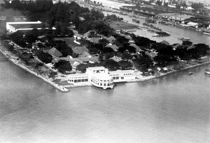 Repronegatif. Societeit marina "Modderlust", Surabaya (foto udara)